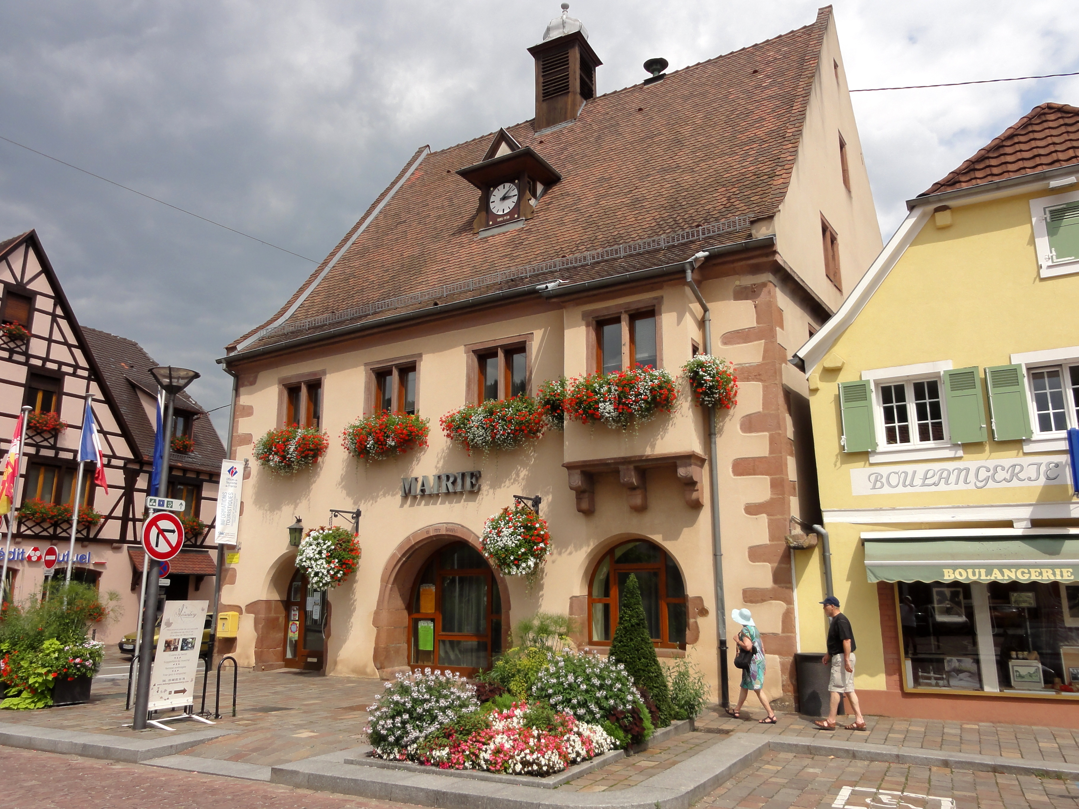 Alsace, Bas-Rhin, Châtenois, Mairie (XVe-XVIe), 81 rue du Maréchal Foch (PA00085268, IA00124438).